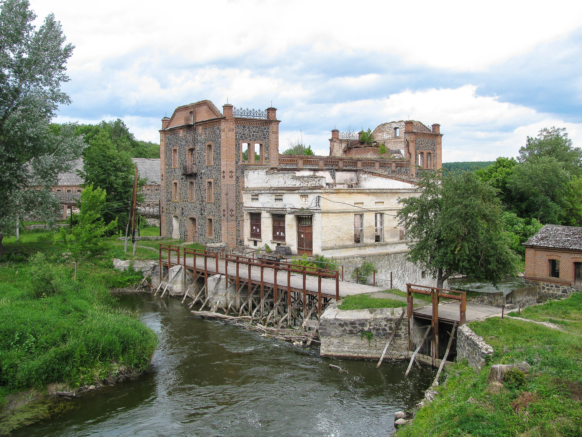 Електростанція та млин, Сокілець, вул. Леніна, 128